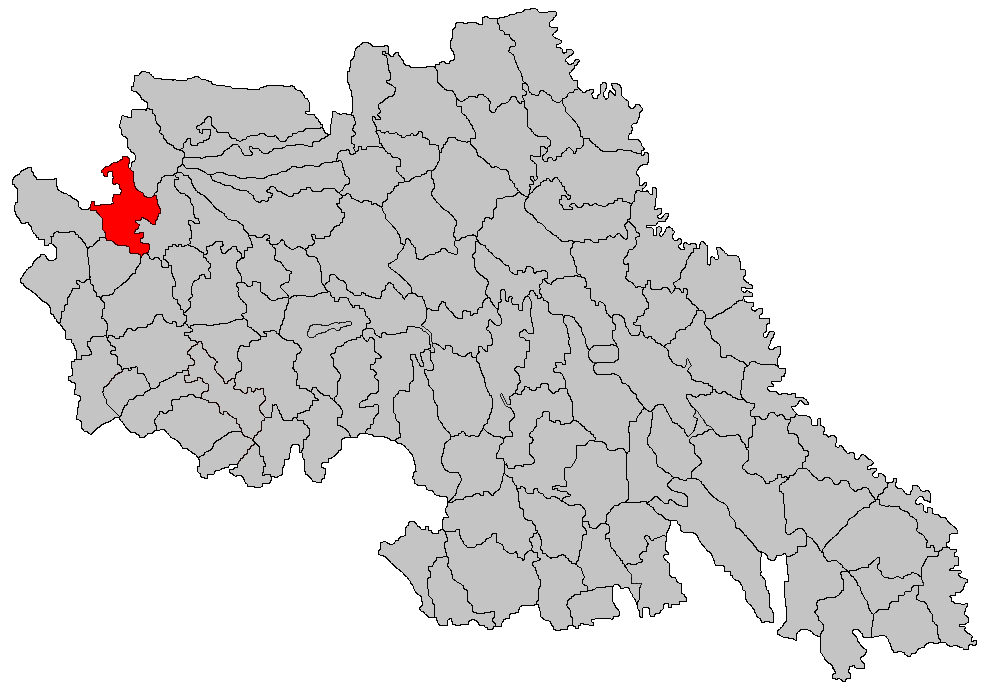 Categorie:Hărţi ale judeţului Iaşi